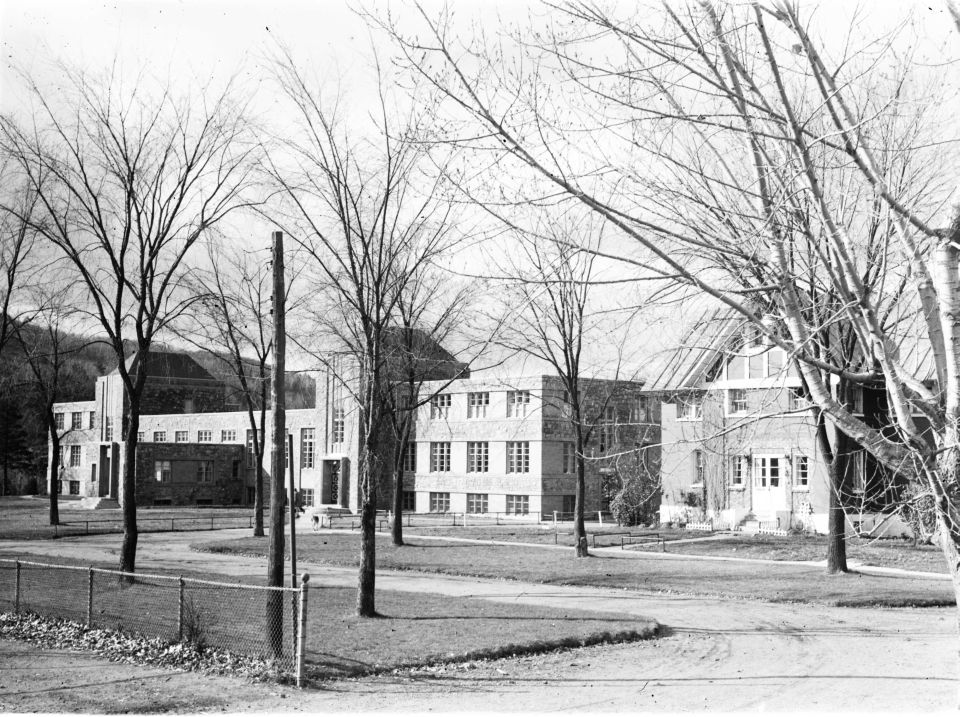 Immeuble abritant l'école Boys' Farm and Training School, rue Saint-Jacques Ouest à Montréal.